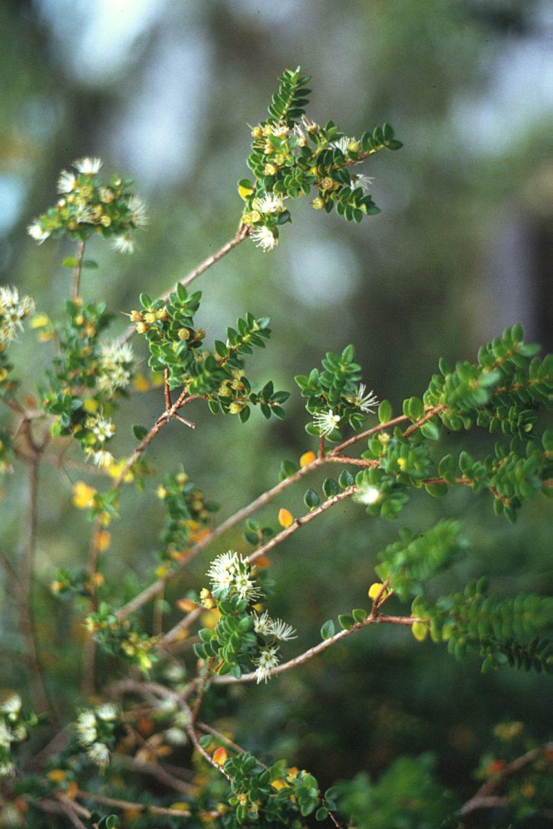 Tepualia stipularis, Myrtaceae - Chile, Salto de Petrohué (Prov. de Llanquihue)